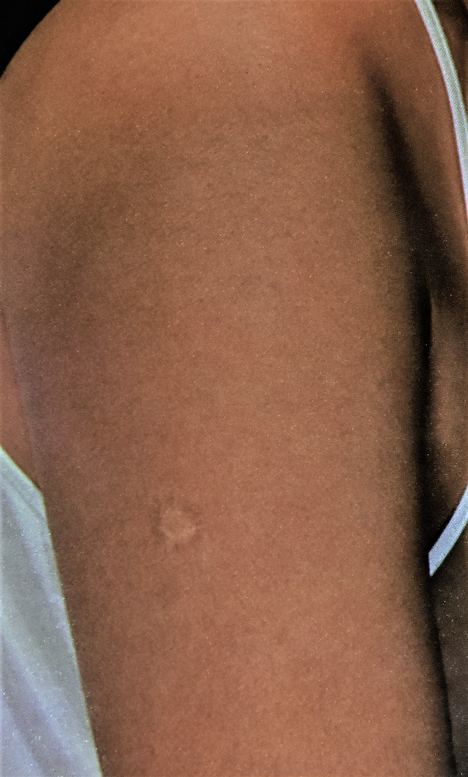 種痘接種後に残る瘢痕